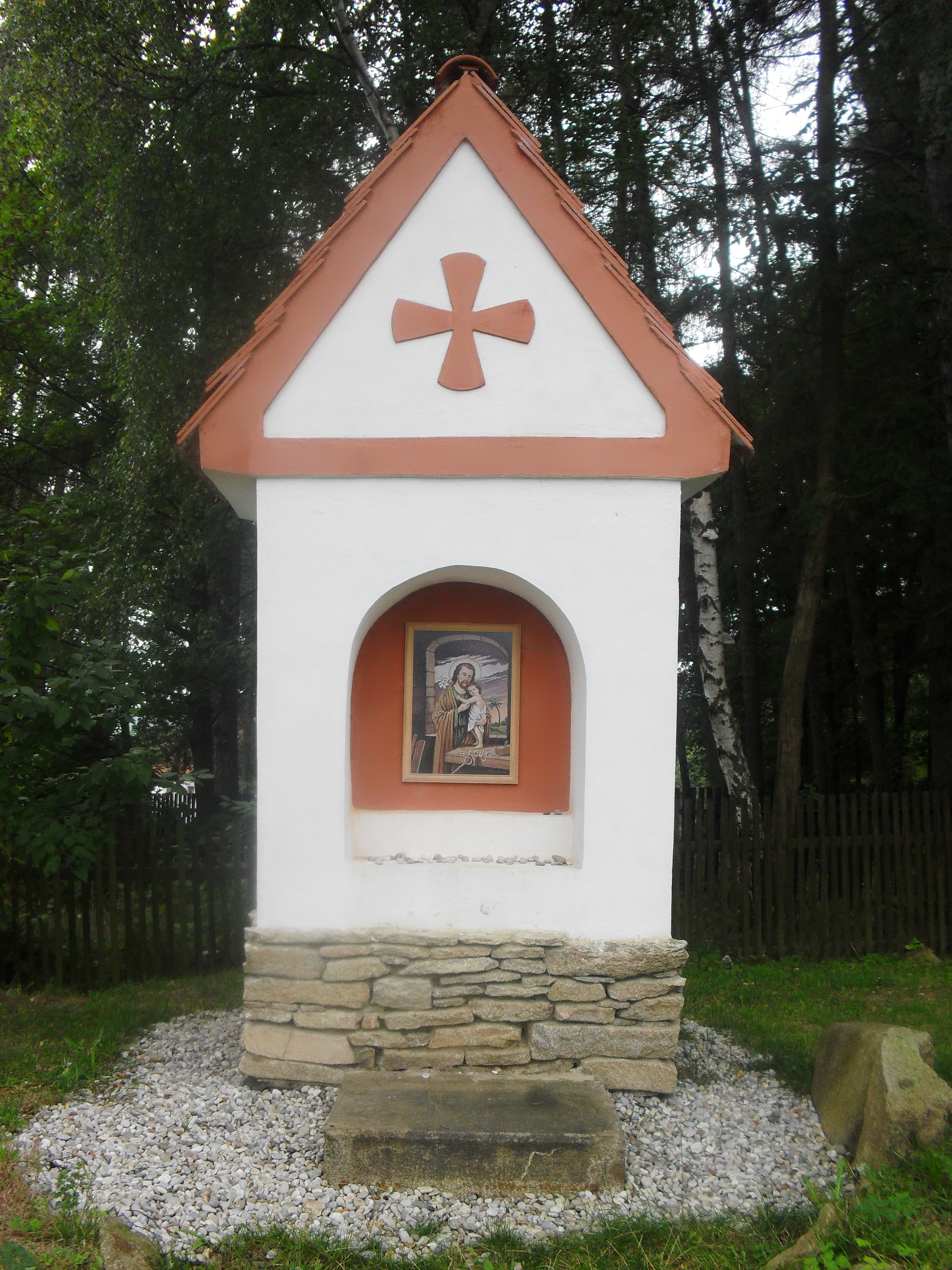 CHANOVICE - Kaplička nacházející se poblíž Chanovického Skanzenu